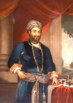 Sa'adat 'Ali Khan II, Yamin ud-Daula